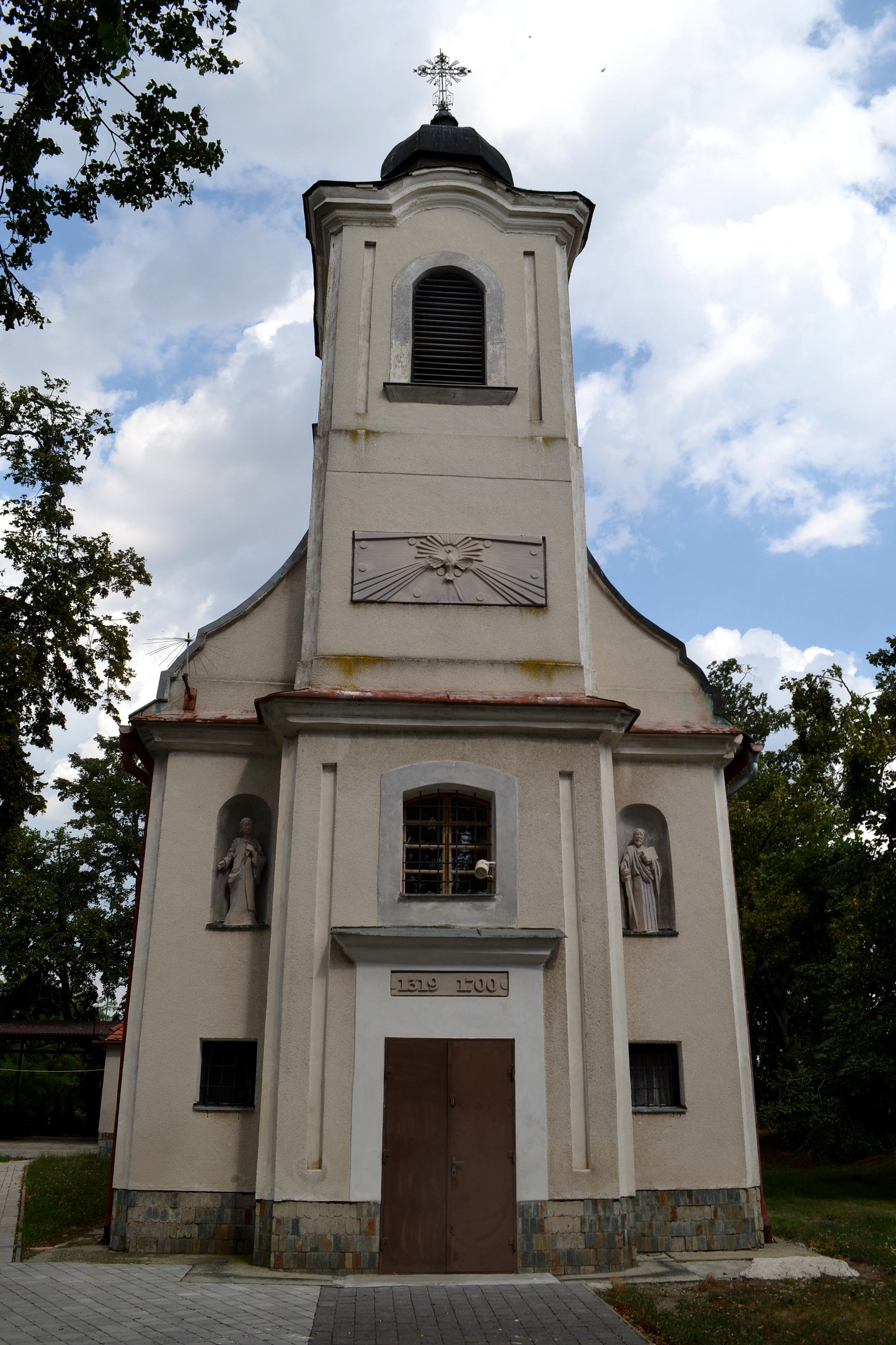 Radava (okr. Nové Zámky), Kostol svätého Ducha; priečelie kostola